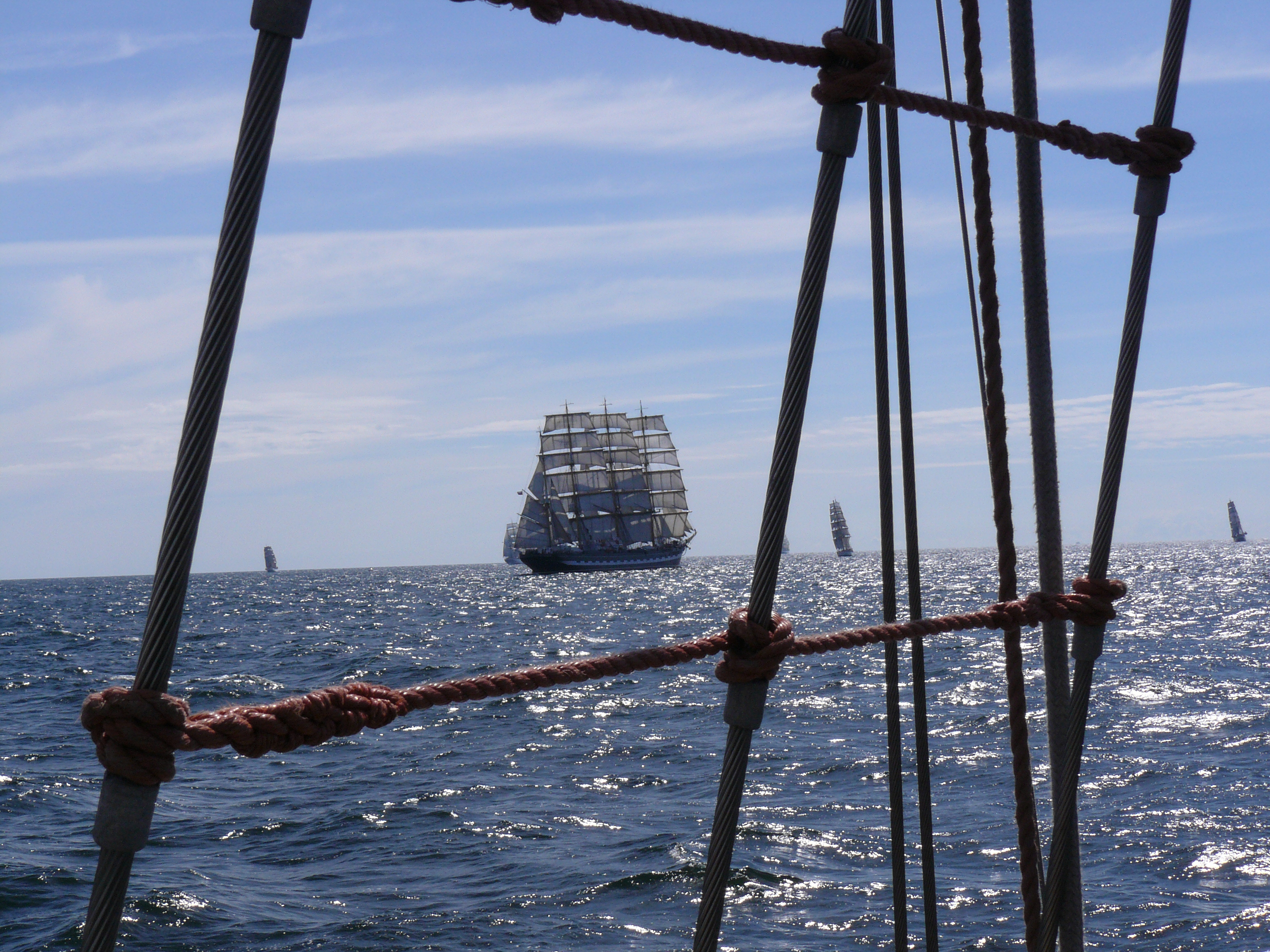 Крузенштерн